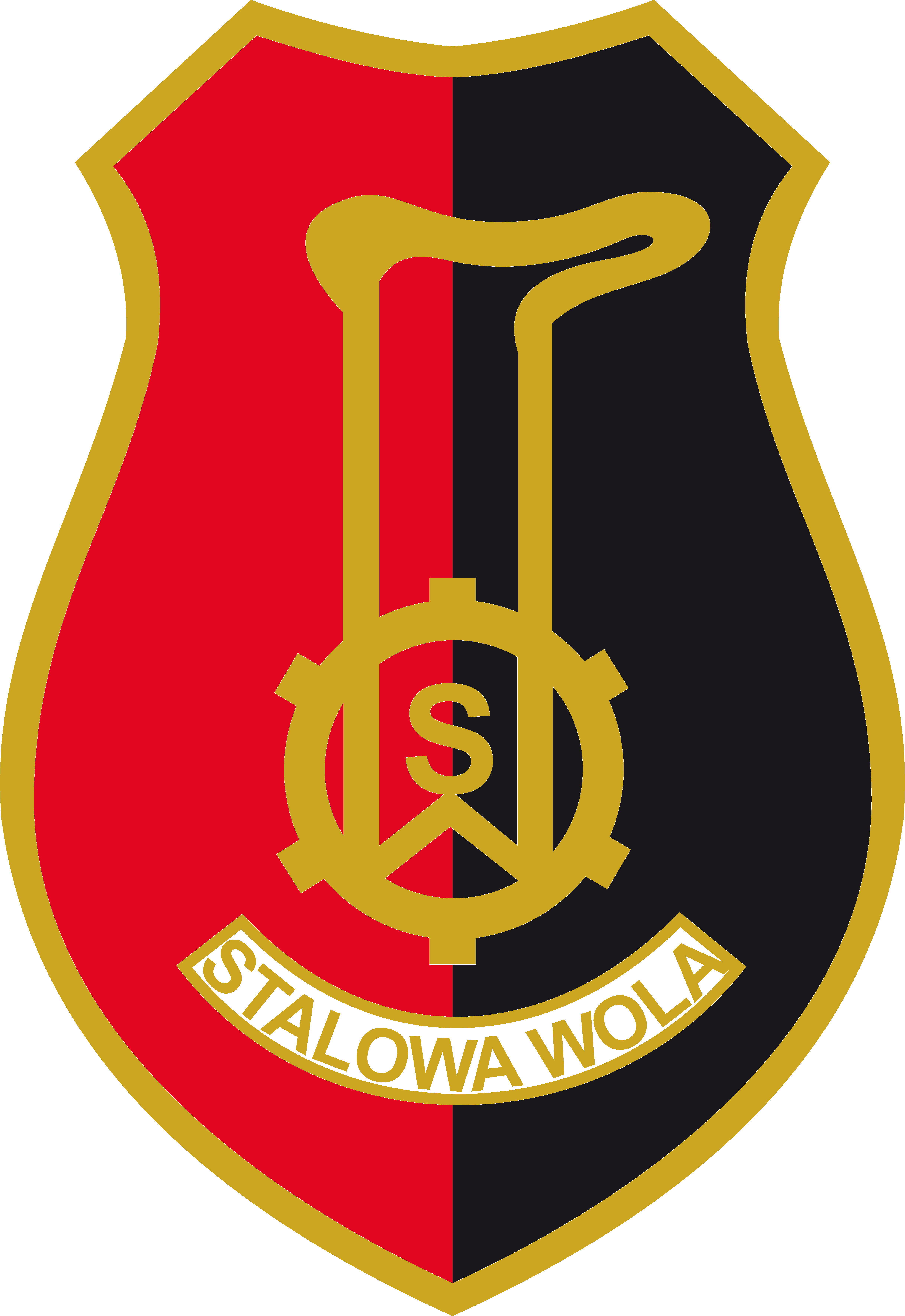 Herb Miasta Stalowej Woli